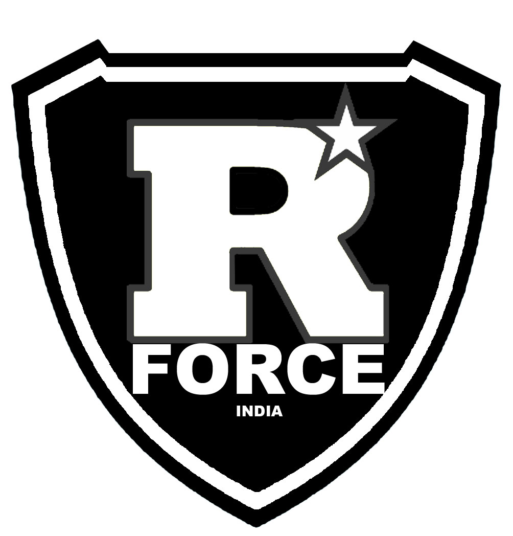 RANGER FORCE INDIA